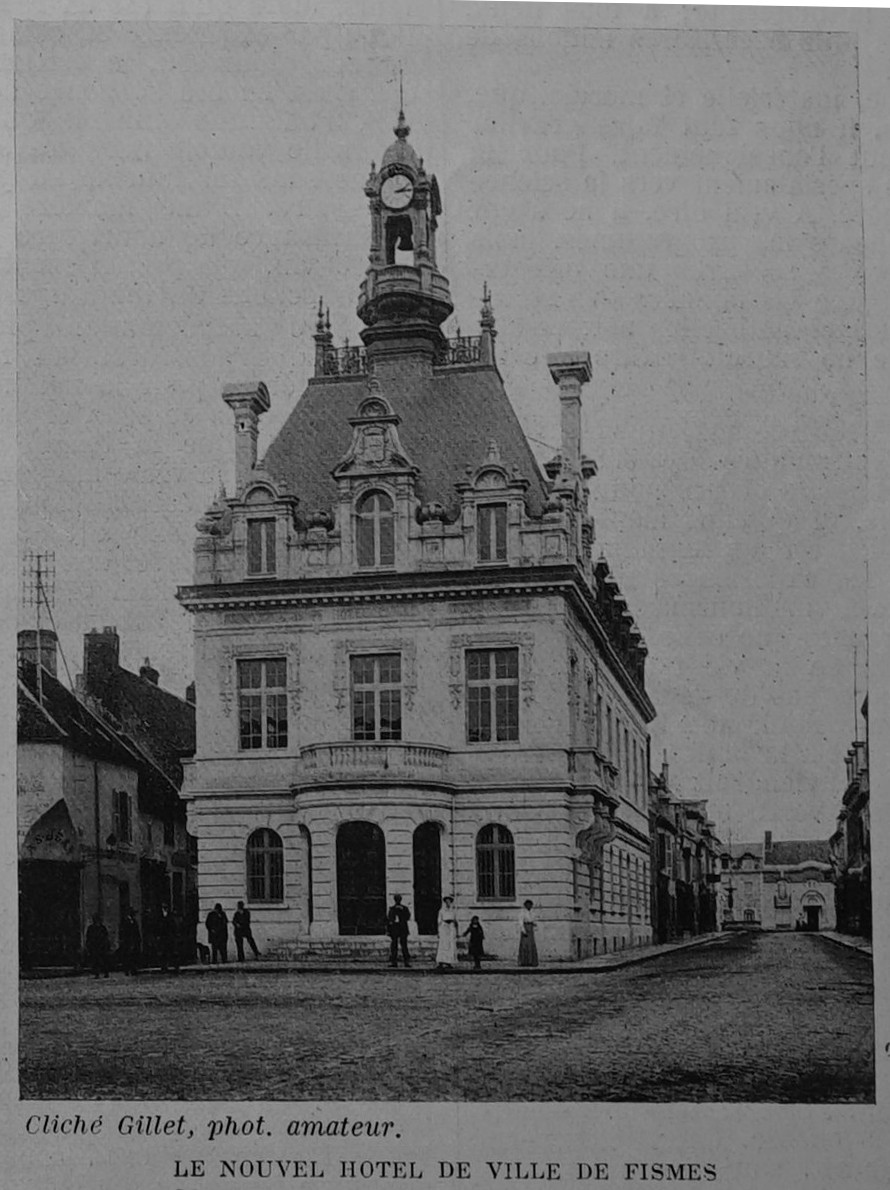 almanach Matot-Braine de 1914.